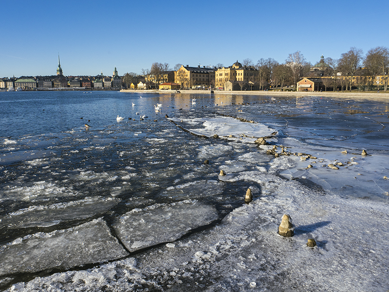 Mot Skeppsholmen. Fornlämning Stockholms socken nr 206 "Område med hamnanläggning och ca 10 vrak". Sjöhistoriska museet tror att det att det kan röra sig om danska skeppet Graa Ulv, som benämns ”nedersjunken” 1670. Graa Ulv byggdes i Neustadt i Holstein 1642. Motiv: Kastellholmen Kategori: HamnmiljöerMot Skeppsholmen. Fornlämning Stockholms socken nr 206 "Område med hamnanläggning och ca 10 vrak". Sjöhistoriska museet tror att det att det kan röra sig om danska skeppet Graa Ulv, som benämns ”nedersjunken” 1670. Graa Ulv byggdes i Neustadt i Holstein 1642.